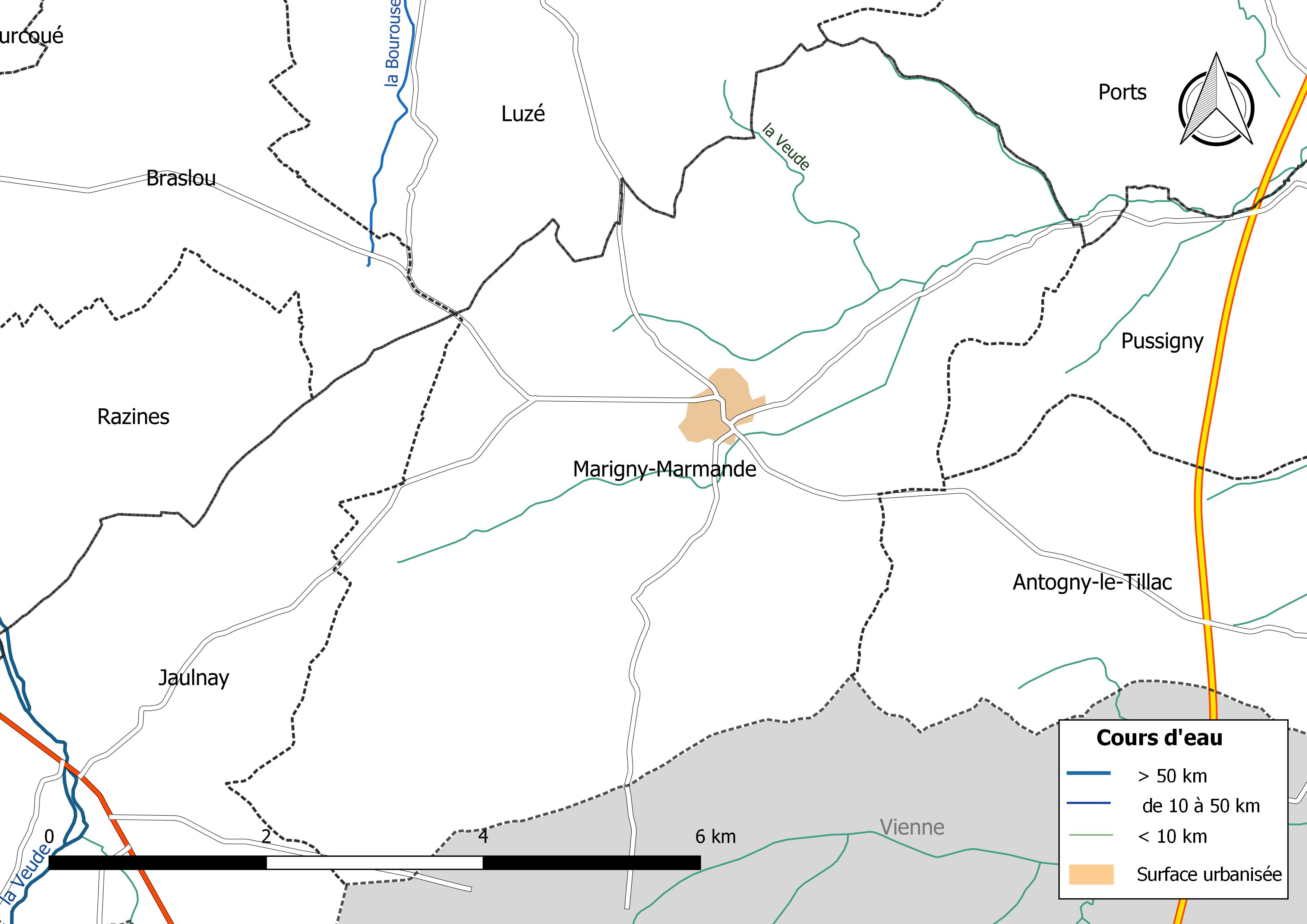 Carte du réseau hydrographique de la commune de Marigny-Marmande (France).